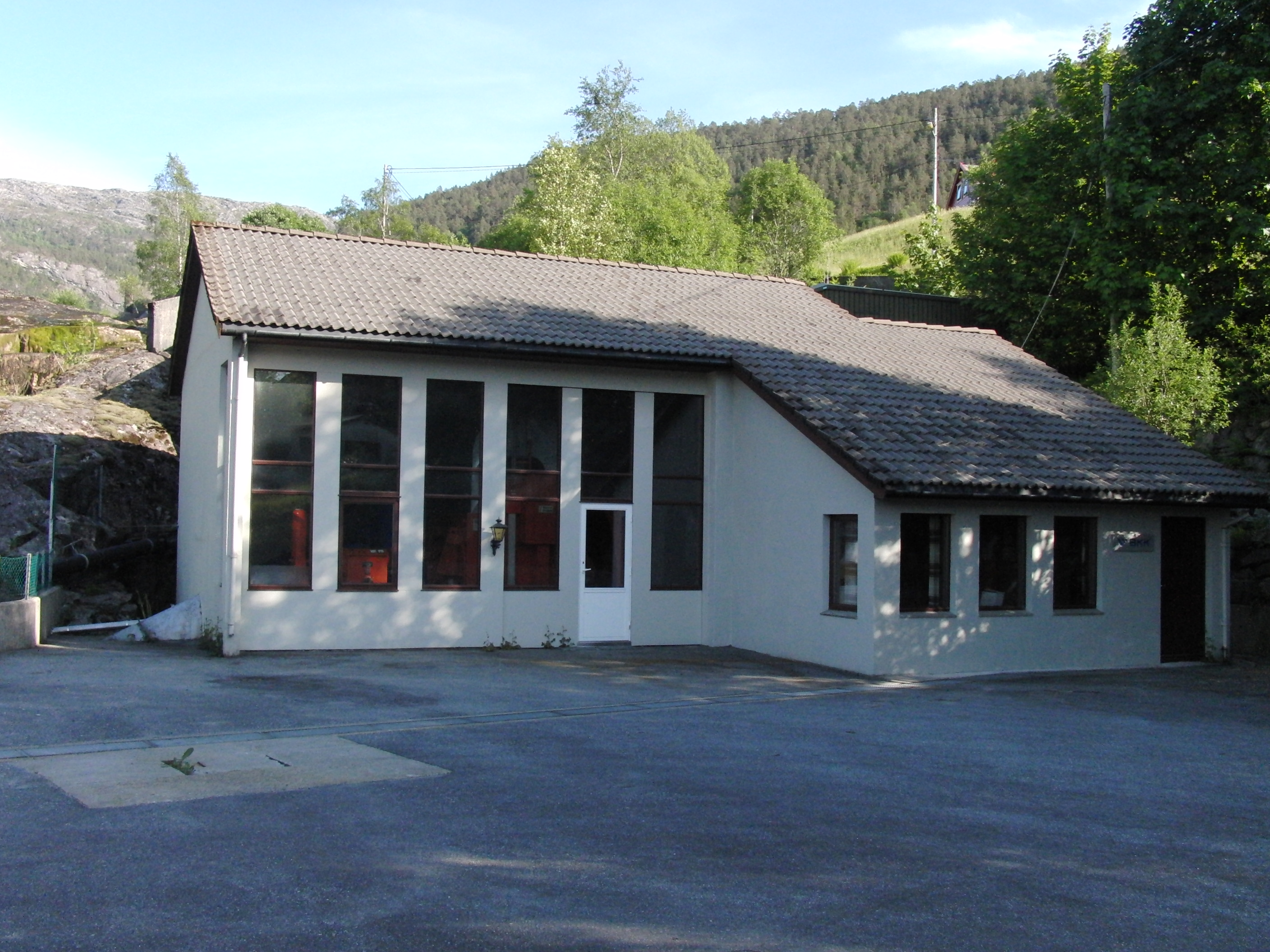 Tøsse kraftverk